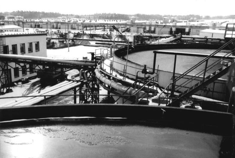 Neustadt-Orla, Blick über Güllesilos ADN-ZB Kaspar-16.2.90-wü Bez.Gera:VEB Schweinezucht und-mast Neustadt -Orla-Die Gülle von 160.000 Tieren wird in diesen Verdichtern gesammelt. In der Umgegend der Anlage sind bereits 600 Hektar Wald geschädigt. Im Gegensatz zu den zahlreichen Ökogruppen und Bürgerinitiativen, die eine Schließung bis Jahresende verlangen, fordern die 800 Beschäftigten sichere Arbeitsplätze und alternative Lösungen.(siehe auch 30N)